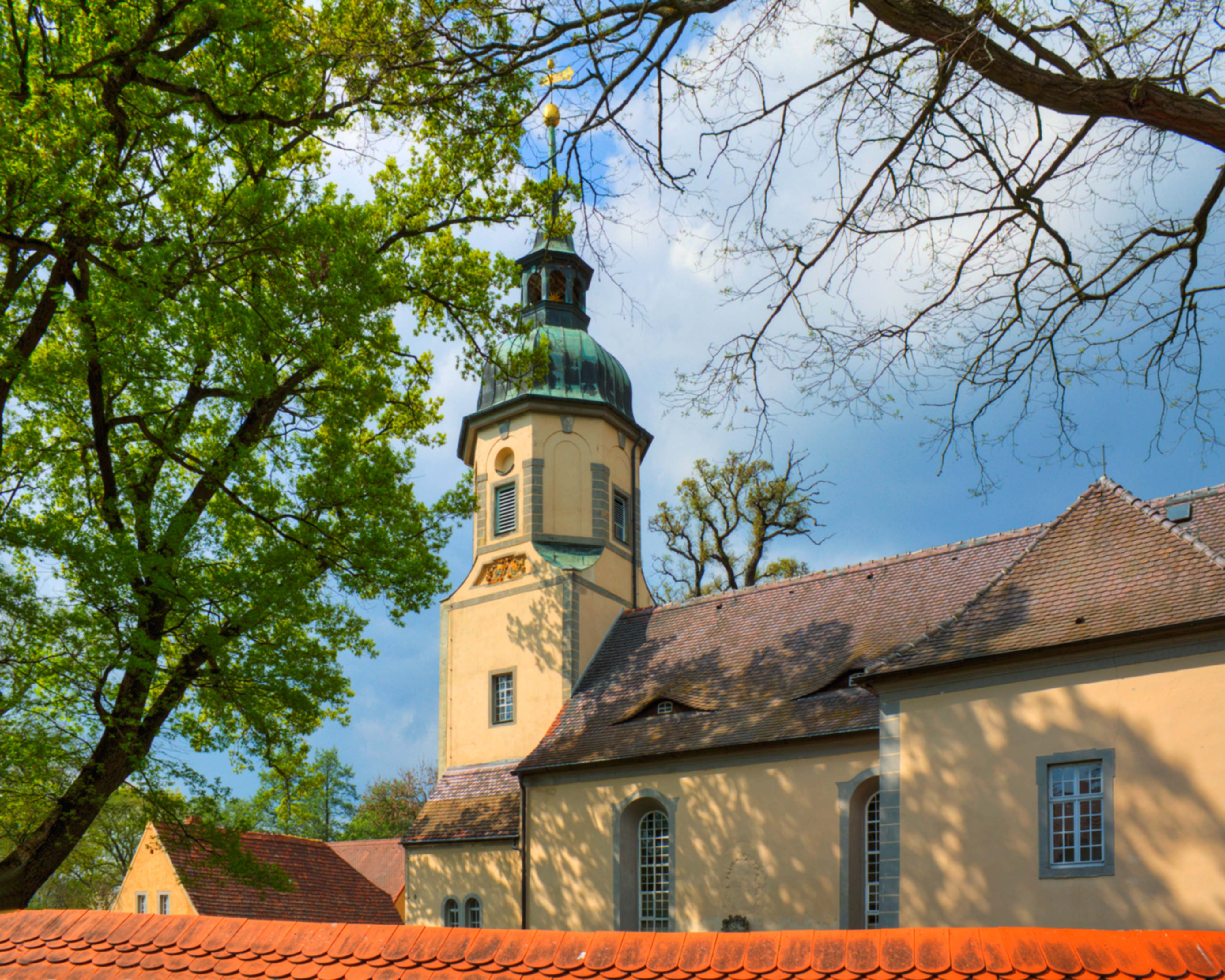 Kirche, Sörnewitzer Straße in Cavertitz OT Lampertswalde